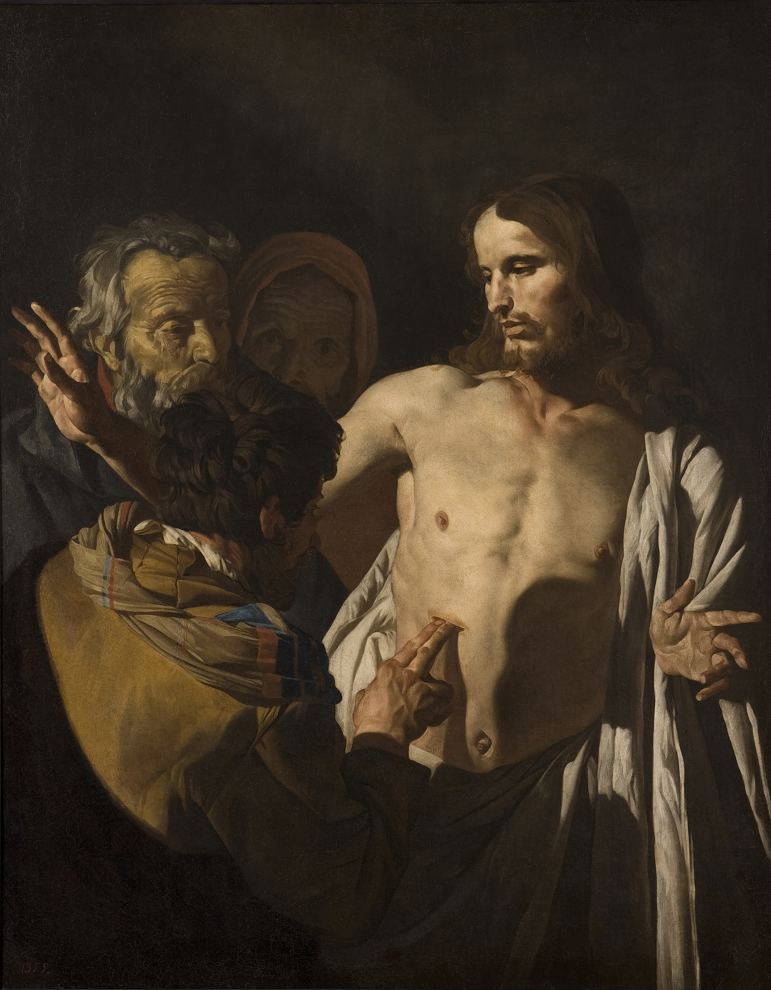 La obra representa al apóstol Santo Tomás introduciendo dos de sus dedos en el costado abierto de Jesucristo después de que este hubiera resucitado de entre los muertos, ya que el apóstol había puesto en duda el hecho de su resurrección.